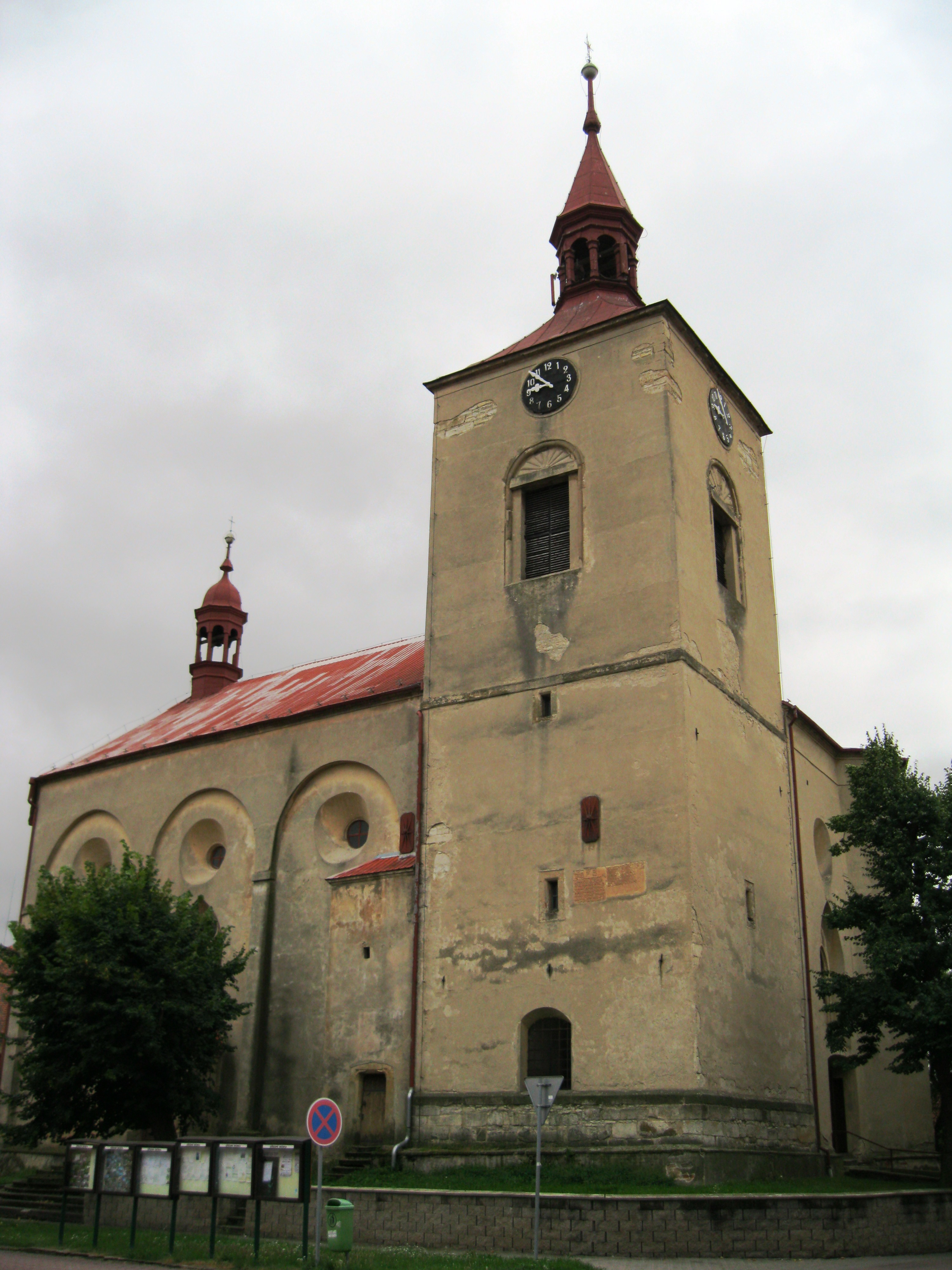 Kostel Narození Panny Marie (Třebenice), Třebenice